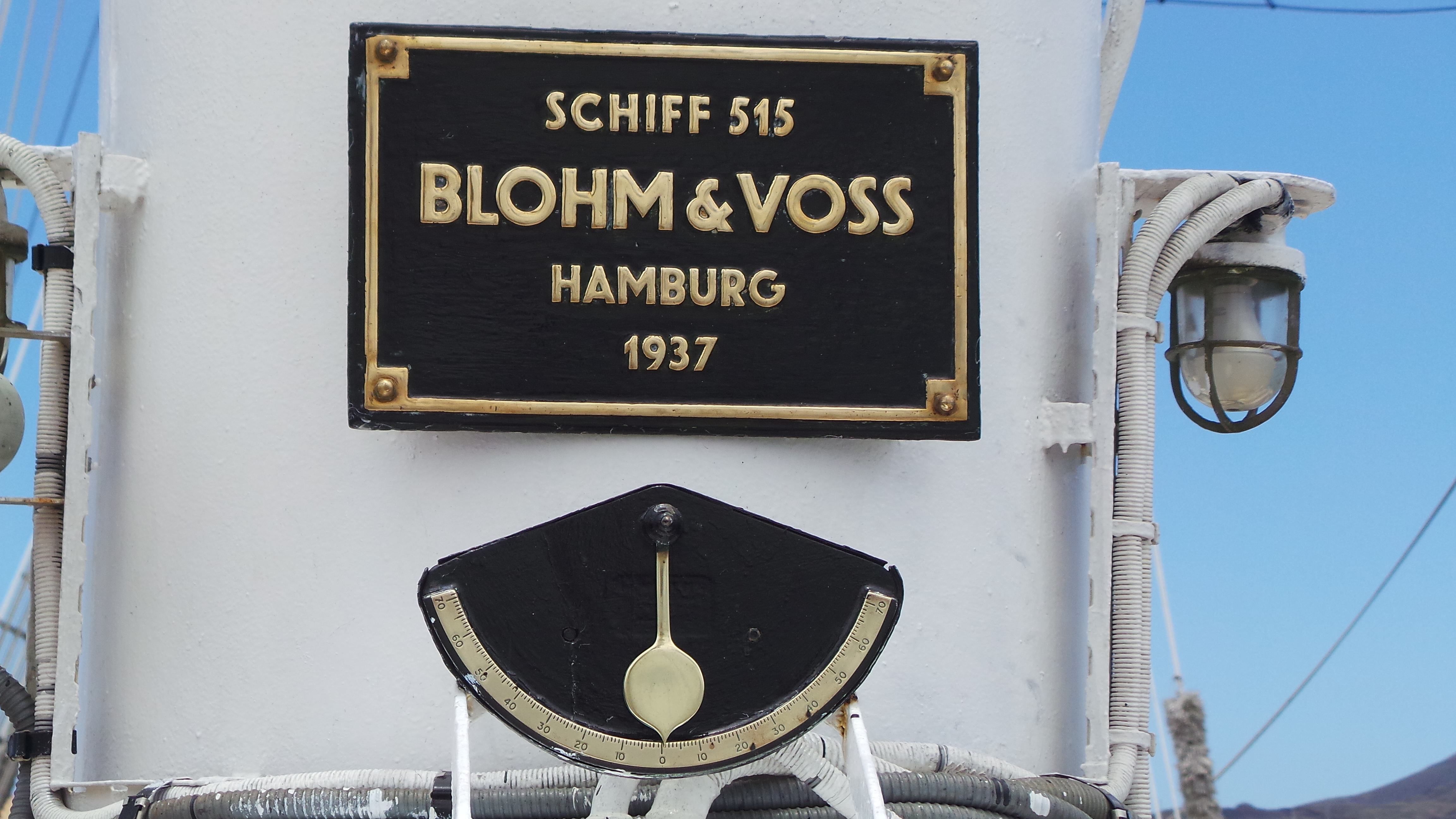 Visita al Buque Escuela NRP Sagres, en La Base Naval de Las Palmas de Gran Canaria. Este fin de semana de semana ( 20, 21 y 22 de junio de 2014) tenemos la oportunidad de disfrutar, en Las Palmas de Gran Canaria, de la visita del buque escuela portugués NRP Sagres, se encuentra atracado en el muelle de la base naval y podrá ser visitado hoy viernes hasta las 19h y mañana sábado de 10 a 12h y de 14 a 19h . El Buque proveniente de Lisboa partirá el domingo hasta Las Azores , para luego regresar a Lisboa, cuenta con unos 60 guardiamarines, con una decena de mujeres entre ellos, que realizan su periodo de instruccion Construido en 1937 en Hamburgo y tras varios avatares, fue adquirido en 1961 por la marina Portuguesa para sustituir al Sagres II, entrando en servicio como Sagres III en febrero de 1962. Tiene 89,5 metros de eslora, 12 de manga y 5,5 de calado, siendo su altura máxima de 45,5 metros. Cuenta además con 1.971 metros cuadrados de vela y desplaza 1.893 toneladas. La figura del mascarón de proa del Sagres III es el Infante D. Henrique nacido el 4 de marzo de 1394, siendo uno de los impulsores de la expansión y descubrimientos portugueses de la época. Más información del Buque : Web del Buque